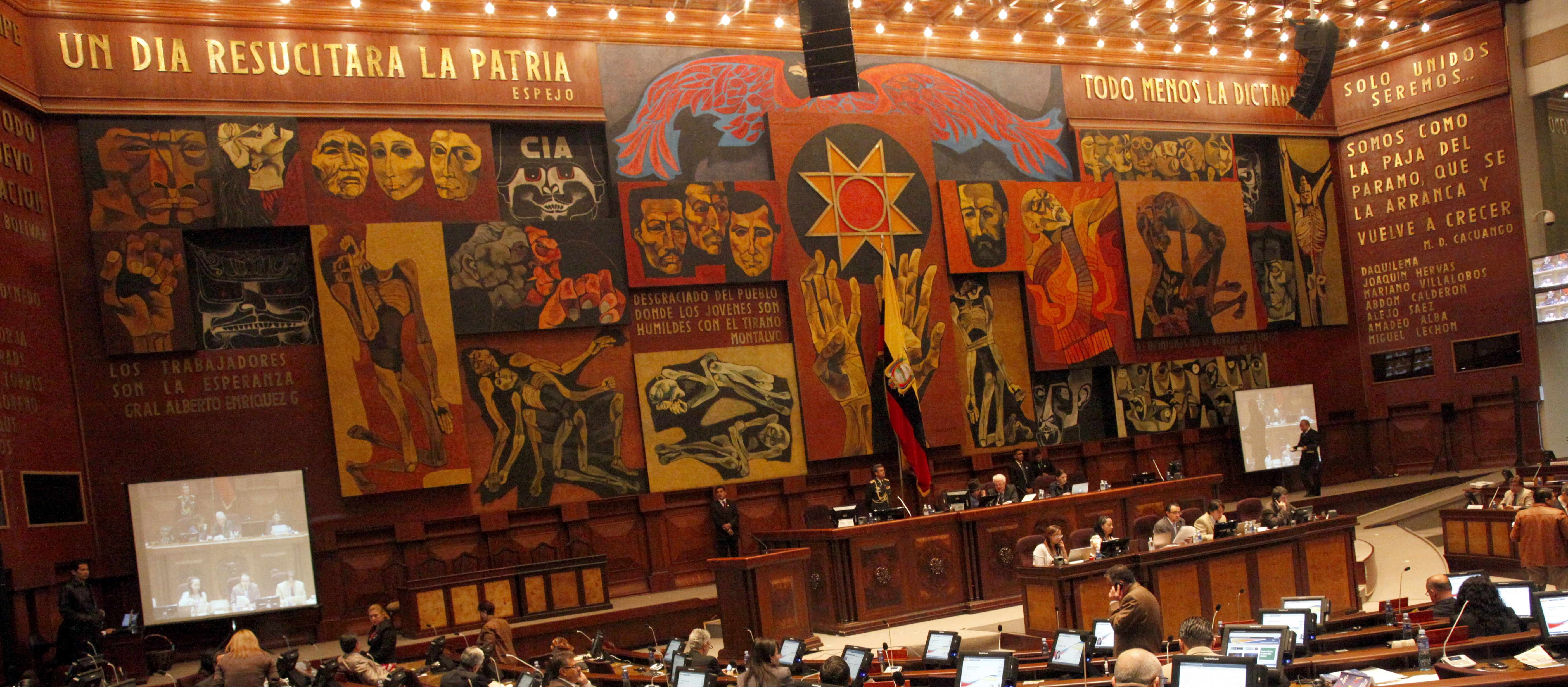 Quito (Ecuador), 22 de mayo del 2012.- Asamblea Nacional decide adhesión a la Convemar. Foto: Xavier Granja Cedeño/Ministerio de Relaciones Exteriores, Comercio e Integración.